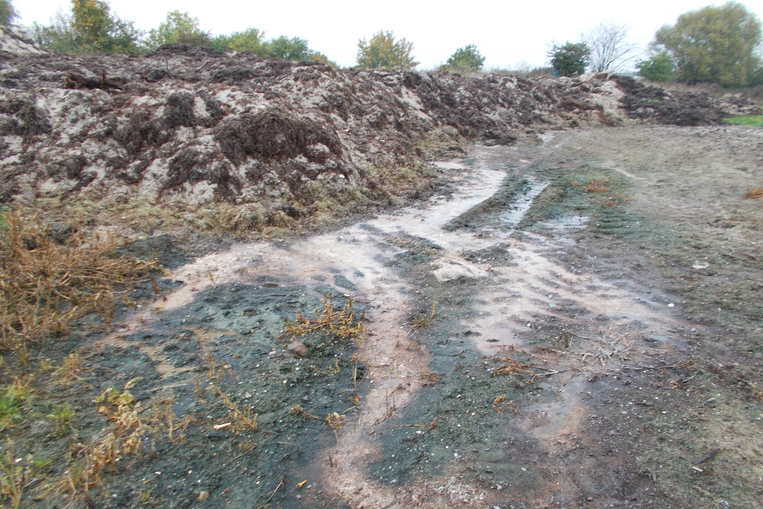 Austritt von belastetem Sickerwasser aus einer unkontrollierten Ablagerung von Strandräumgut.